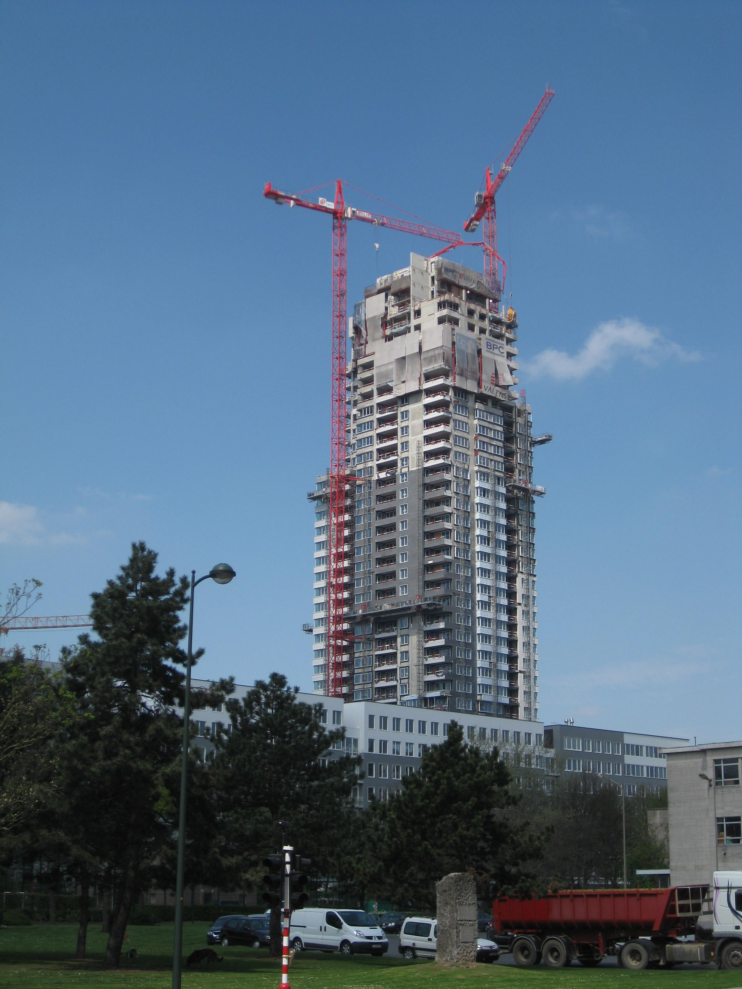 Liste des plus hauts gratte-ciel de Bruxelles